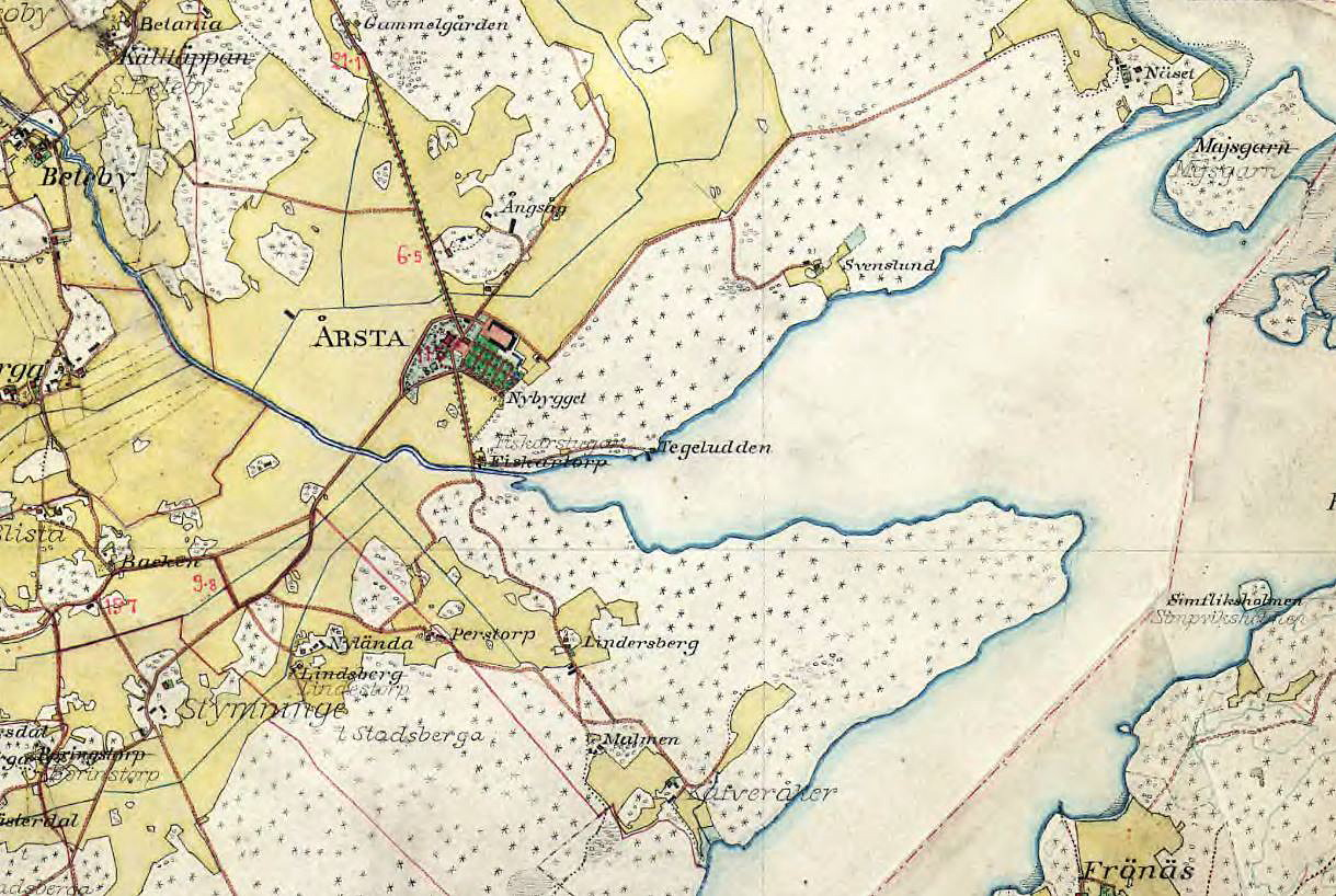 Årsta slott med omgivning på Häradsekonomiska kartan